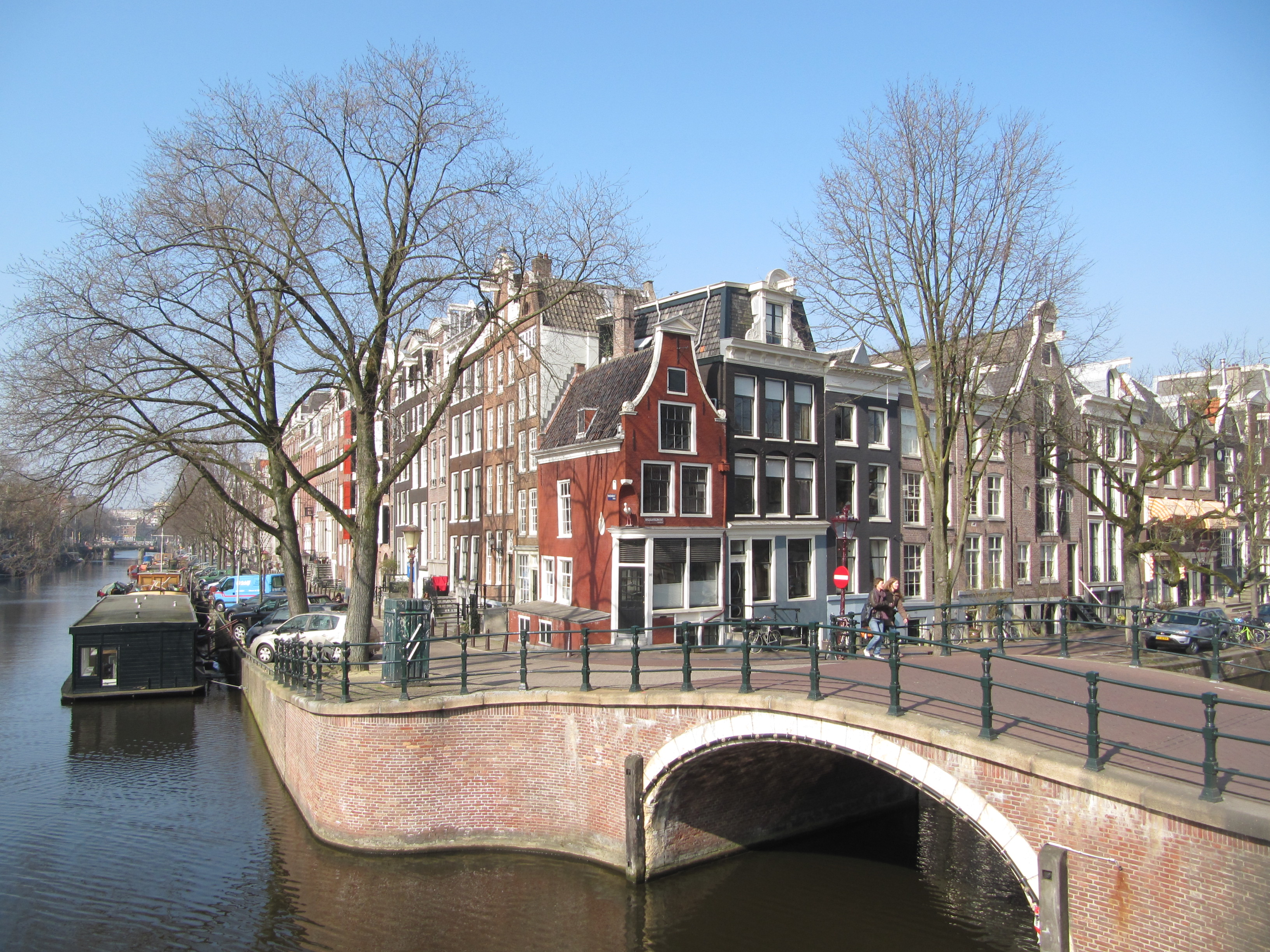 RM4945 RM4944 Reguliersgracht 92 en 90.jpg